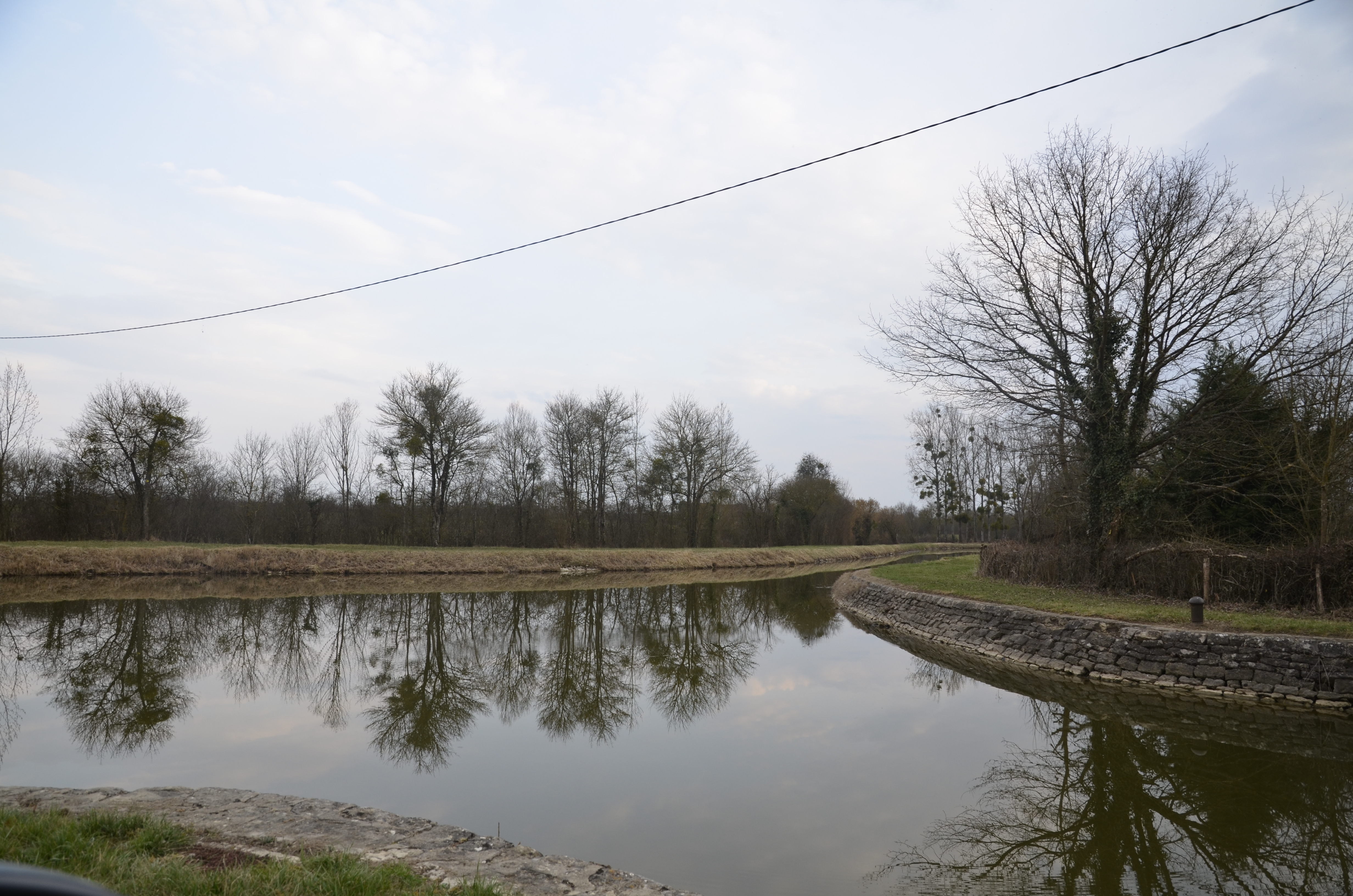 Intersection des trois branches du Canal de Berry à Fontblisse, vue depuis la branche Nord-Ouest (commune de Bannegon)